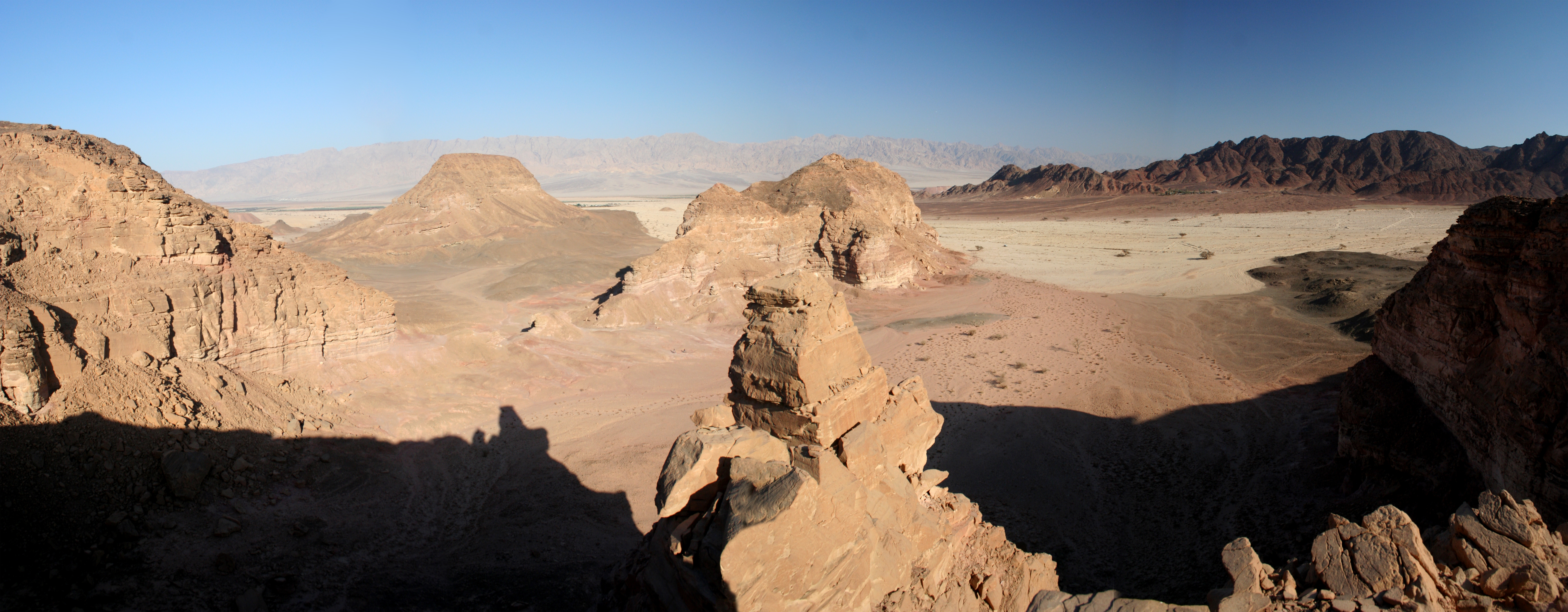 מבט לעמק ססגון מהר מכרות